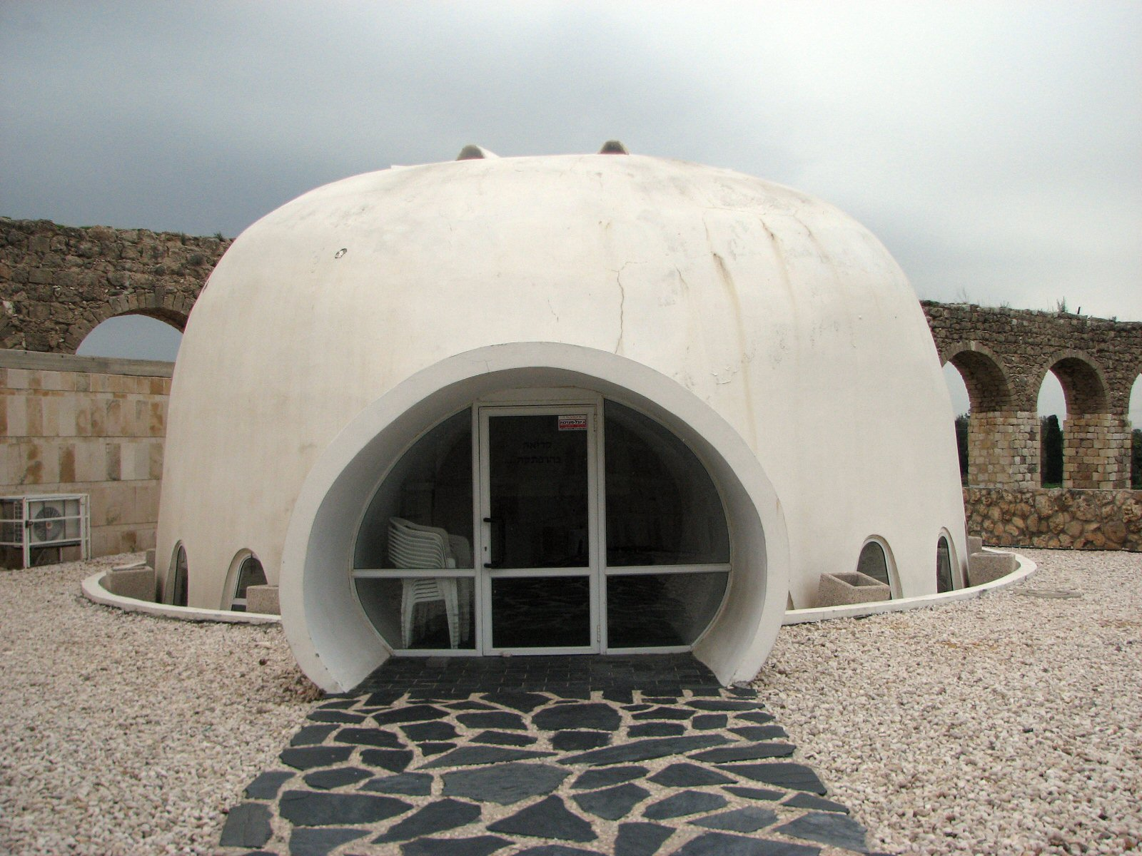 בנין "קריאה בהרפתקה" חלק מהמוזיאון "יד לילד" בקבוץ לוחמי הגטאות נוצר על ידי משתמש:Andrei